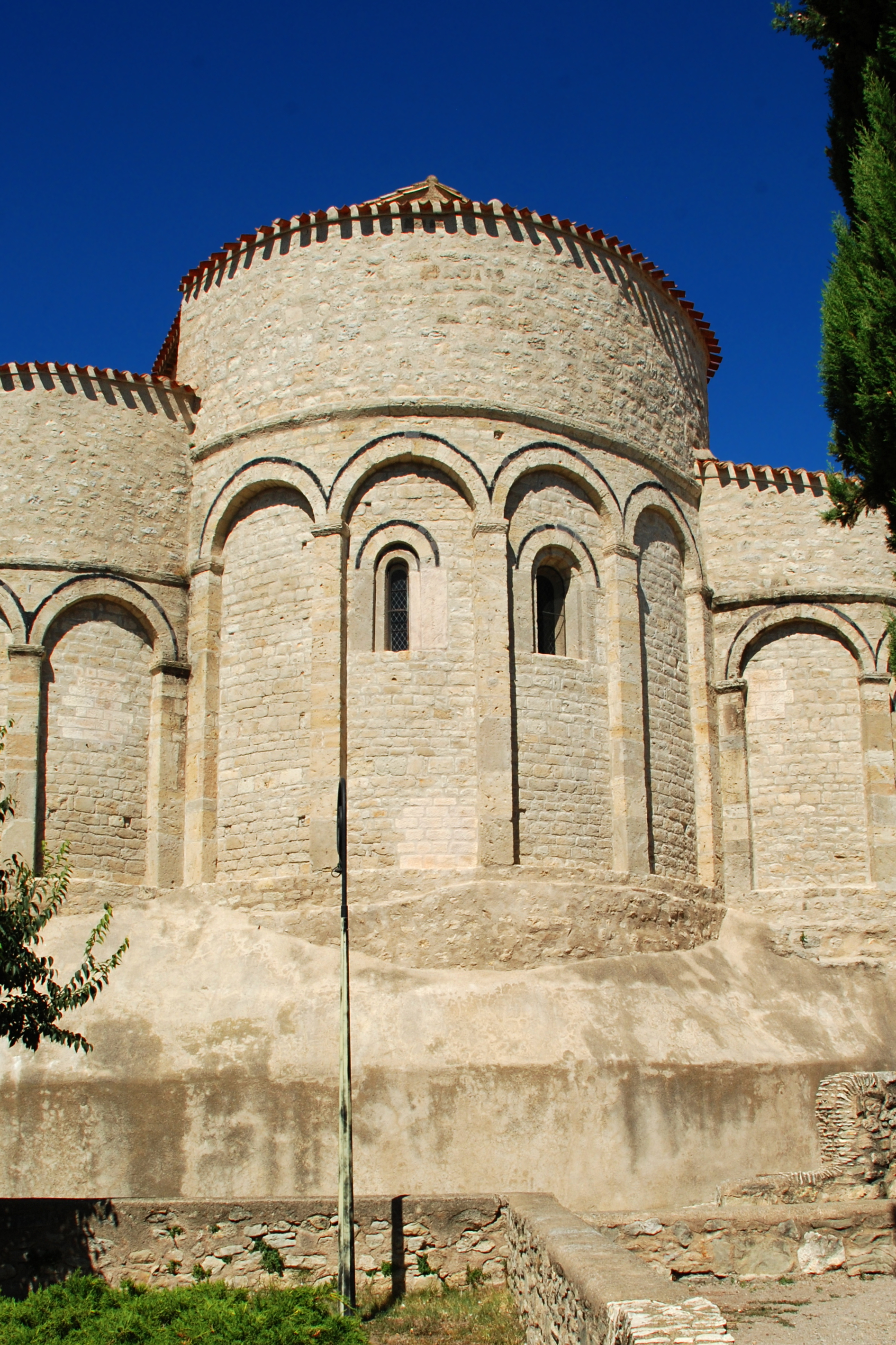 France - Languedoc - Aude - Église Saint-Jean l’Évangéliste d'Ouveillan